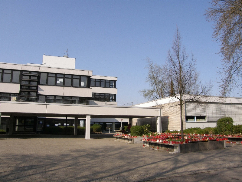 Das Gebäude im Hintergrund ist nicht die Realschule, sondern der Komplex, der das Lessing-Gymnasium (kurz: LGW) und die Robert-Boehringer-Hauptschule beinhaltet. Der Schulhof wird/wurde von Schülern aller drei Schulen benutzt.